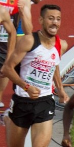 0685 1500m reeksen kimeli